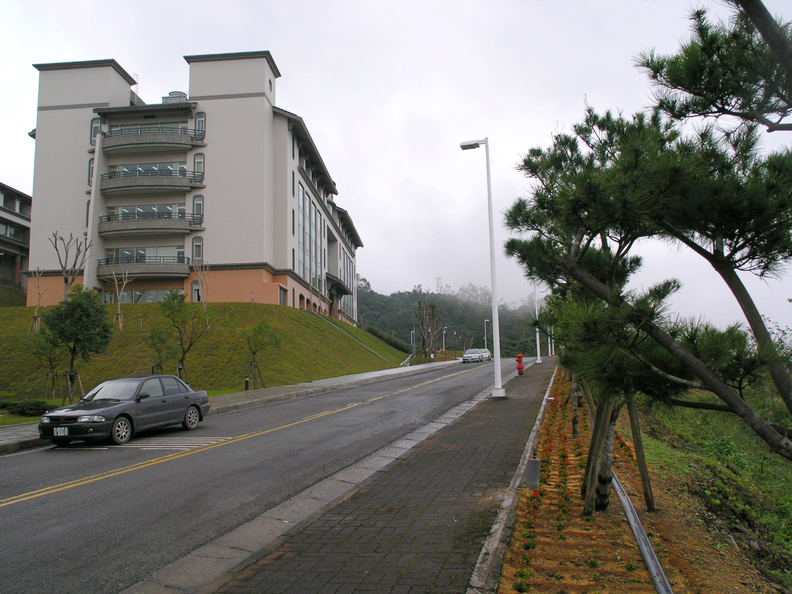 中文（台灣）: 佛光大學圖書館。